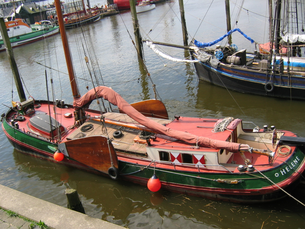 Skansen Hamburg Overglöne - barkas typu holenderskiego - guffa